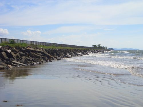 Kawasan luar pantai di Landasan Lapangan Terbang Antarabangsa Kota Kinabalu